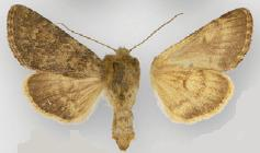 Lasionycta silacea female